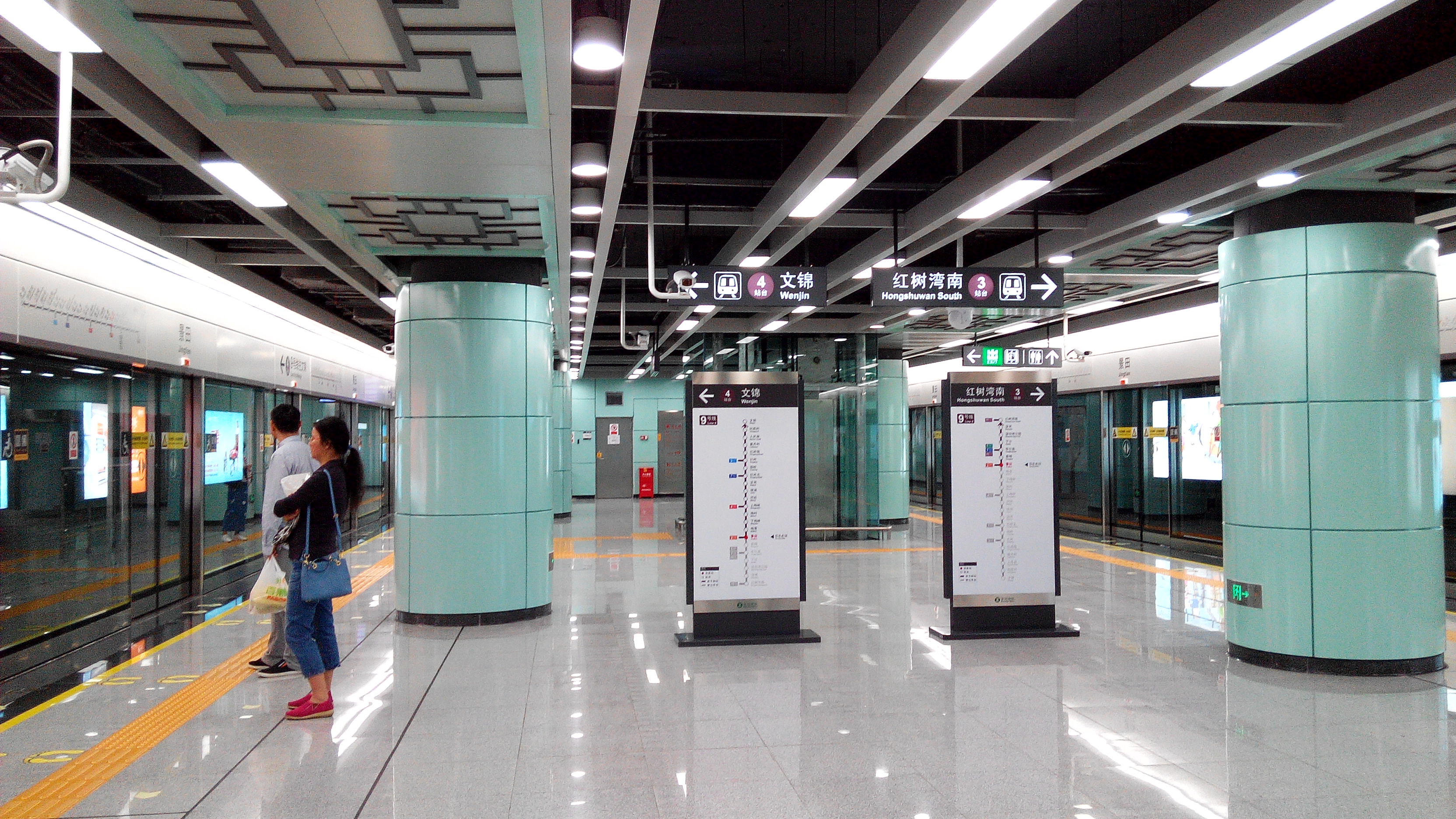 深圳地铁9号线 景田站站台